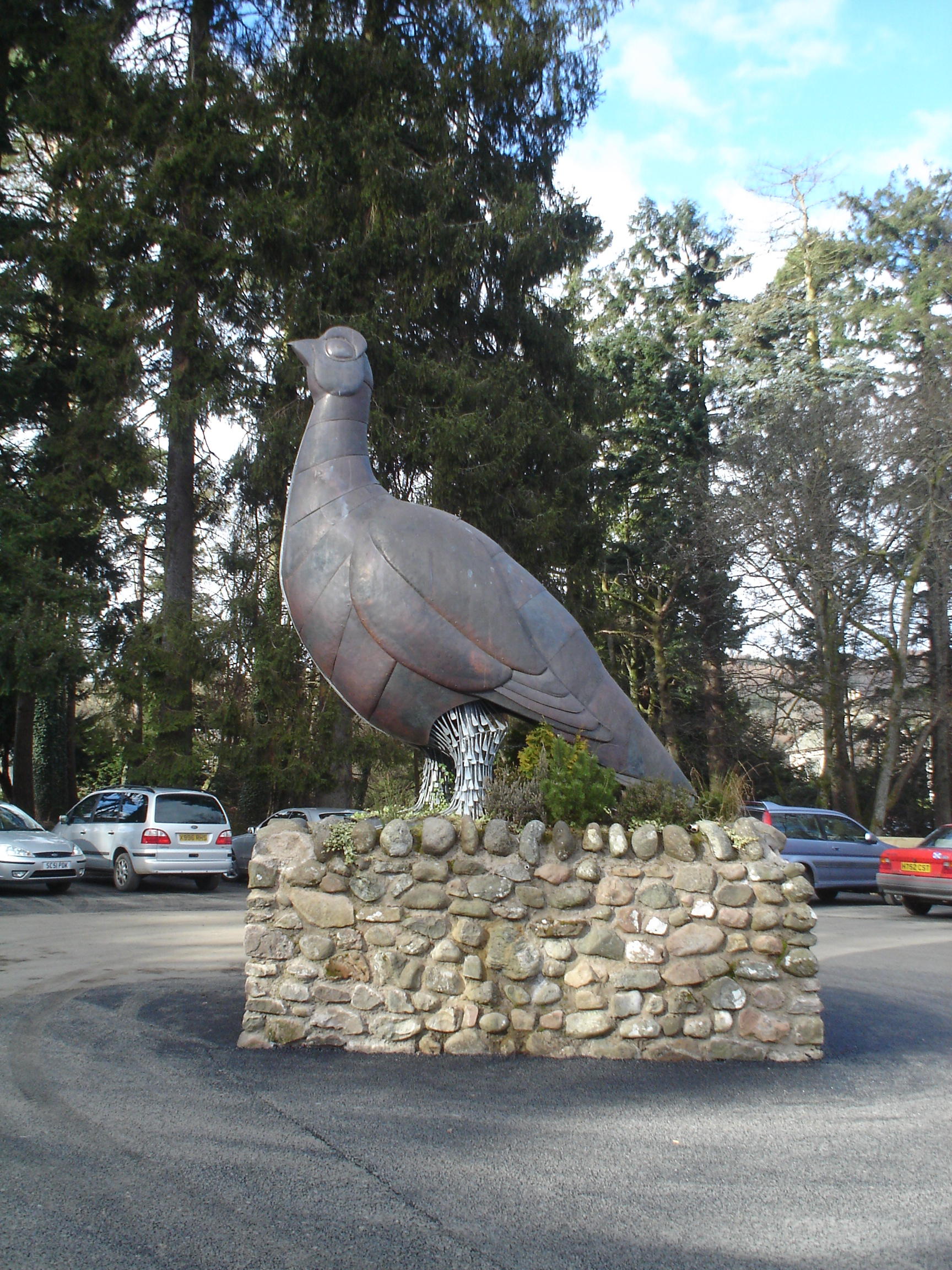 Autore= Neil Richards [1] Fonte= Flickr [2] Descrizione= Il simbolo di The Famous Grouse (statue at Glenturret) Licenza= CC-BY 2.0 Note=